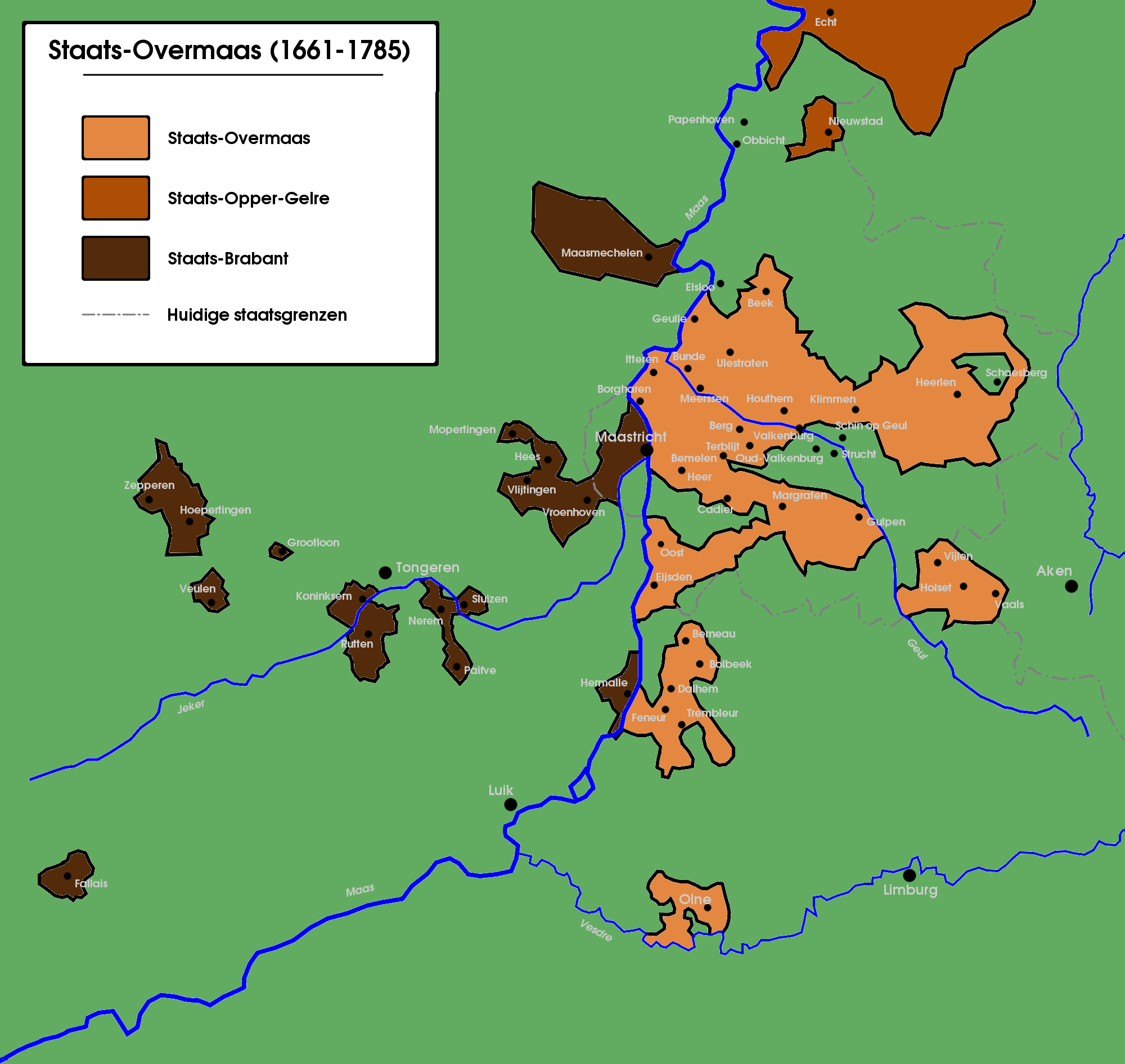 Kaart van Staats-Overmaas tussen het sluiten van het Partagetractaat in 1661 totaan de Verdrag van Fontainebleau in 1785.